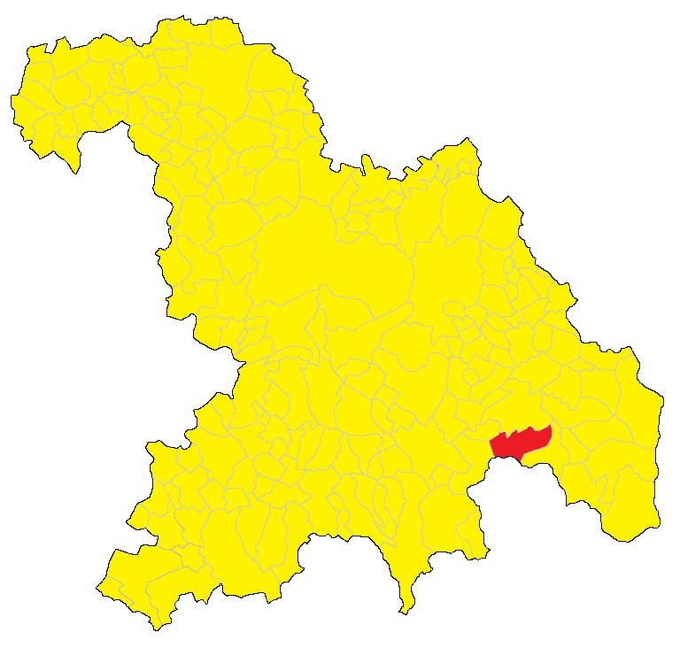 Mappa del comune di Grondona (AL)